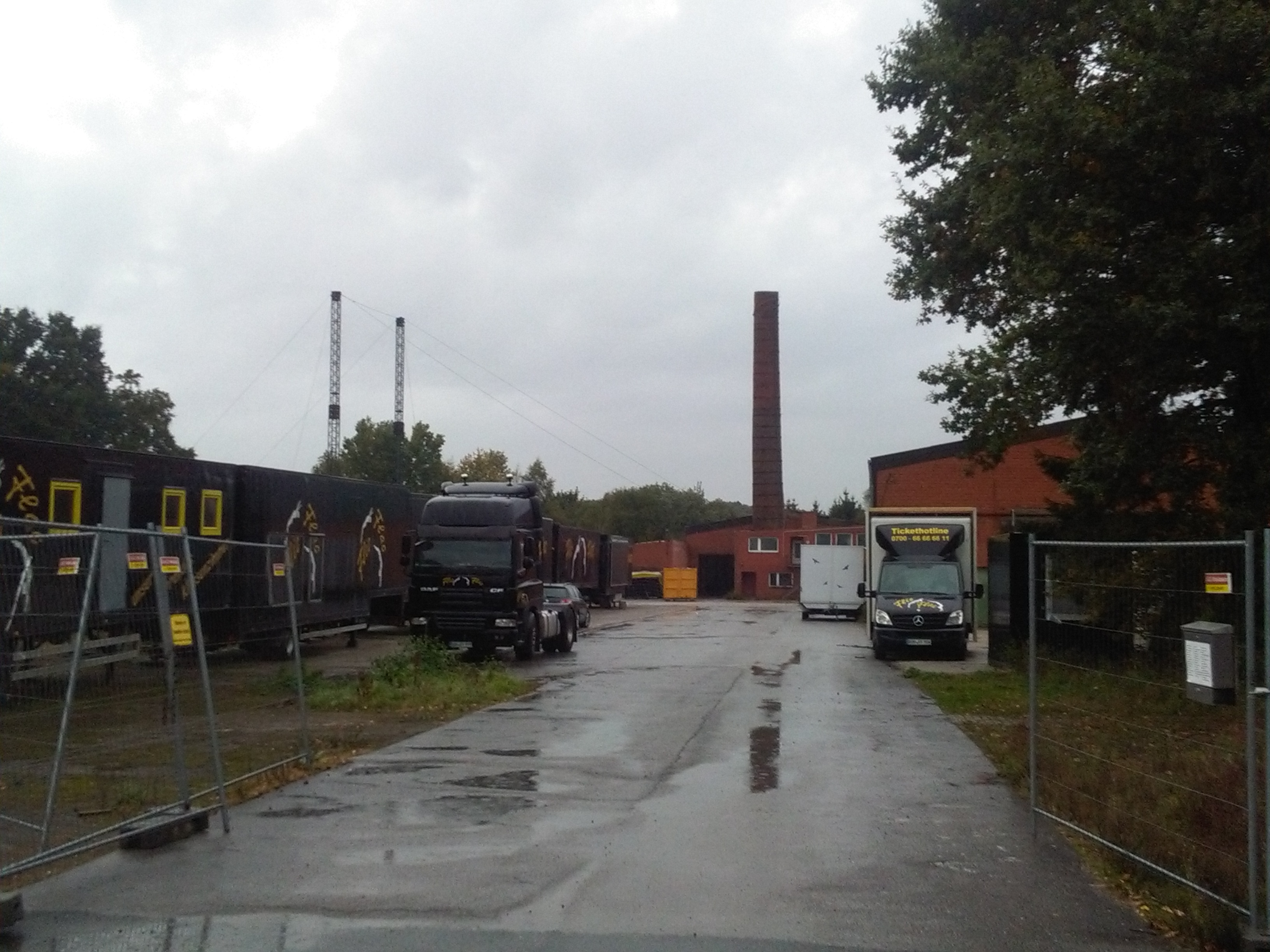 Geländeeinfahrt in Borken